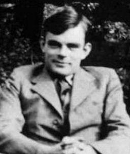 Alan Turing az 1930-as években.